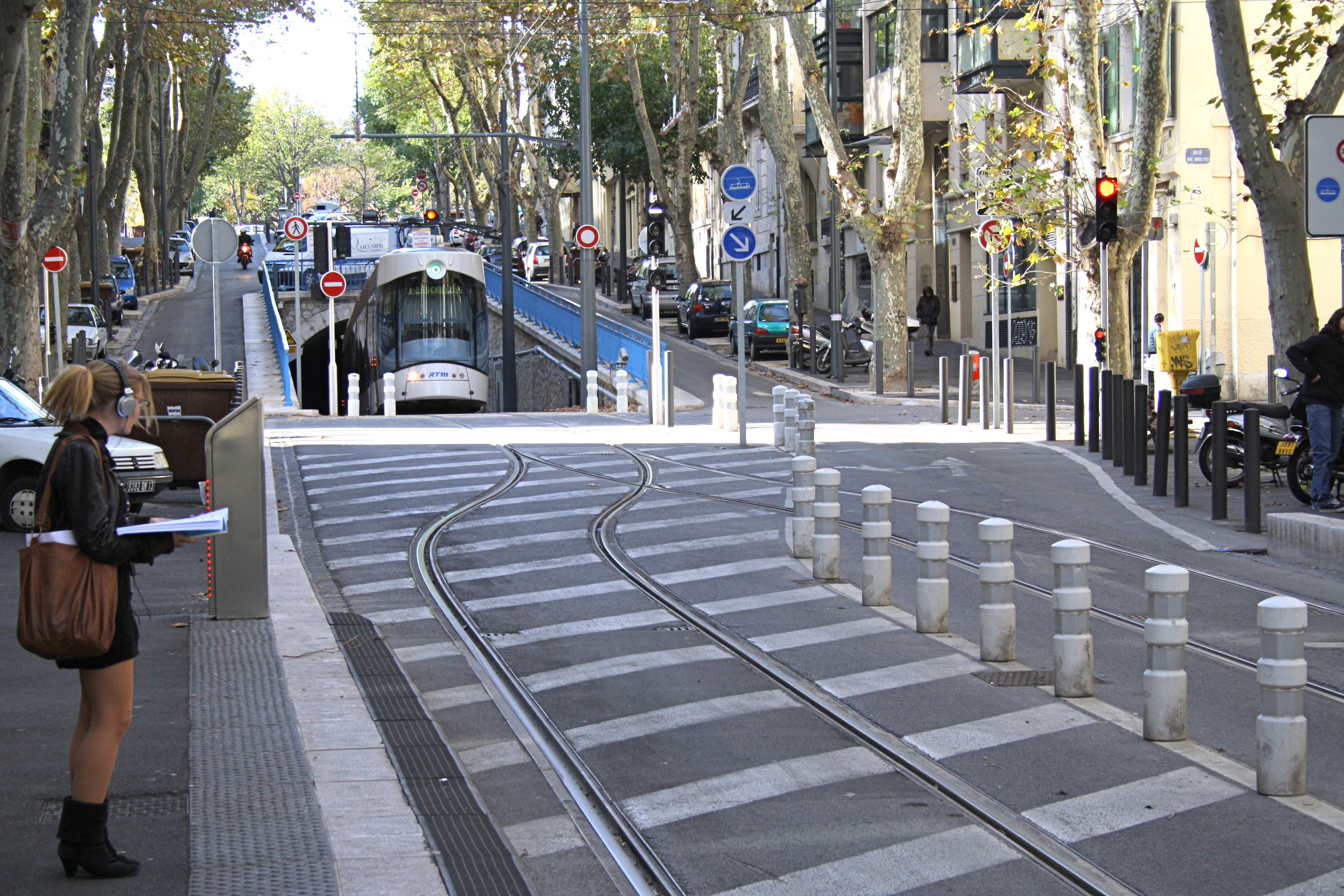 Marseille Tunnelmund Eugène Pierre